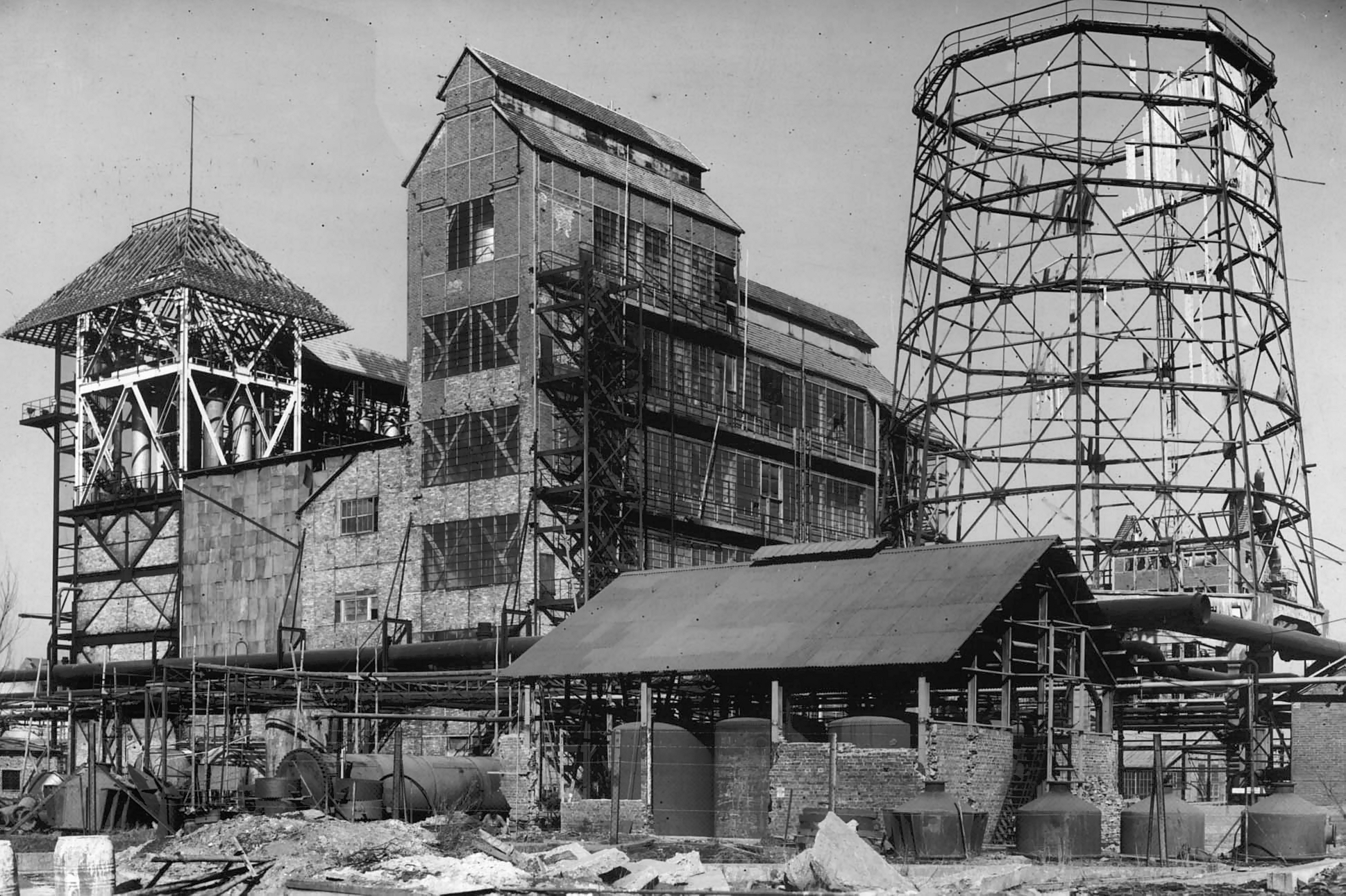 Wiederaufbau Aldehydanlage - heute Chemiepark Knapsack, Huerth, Germany